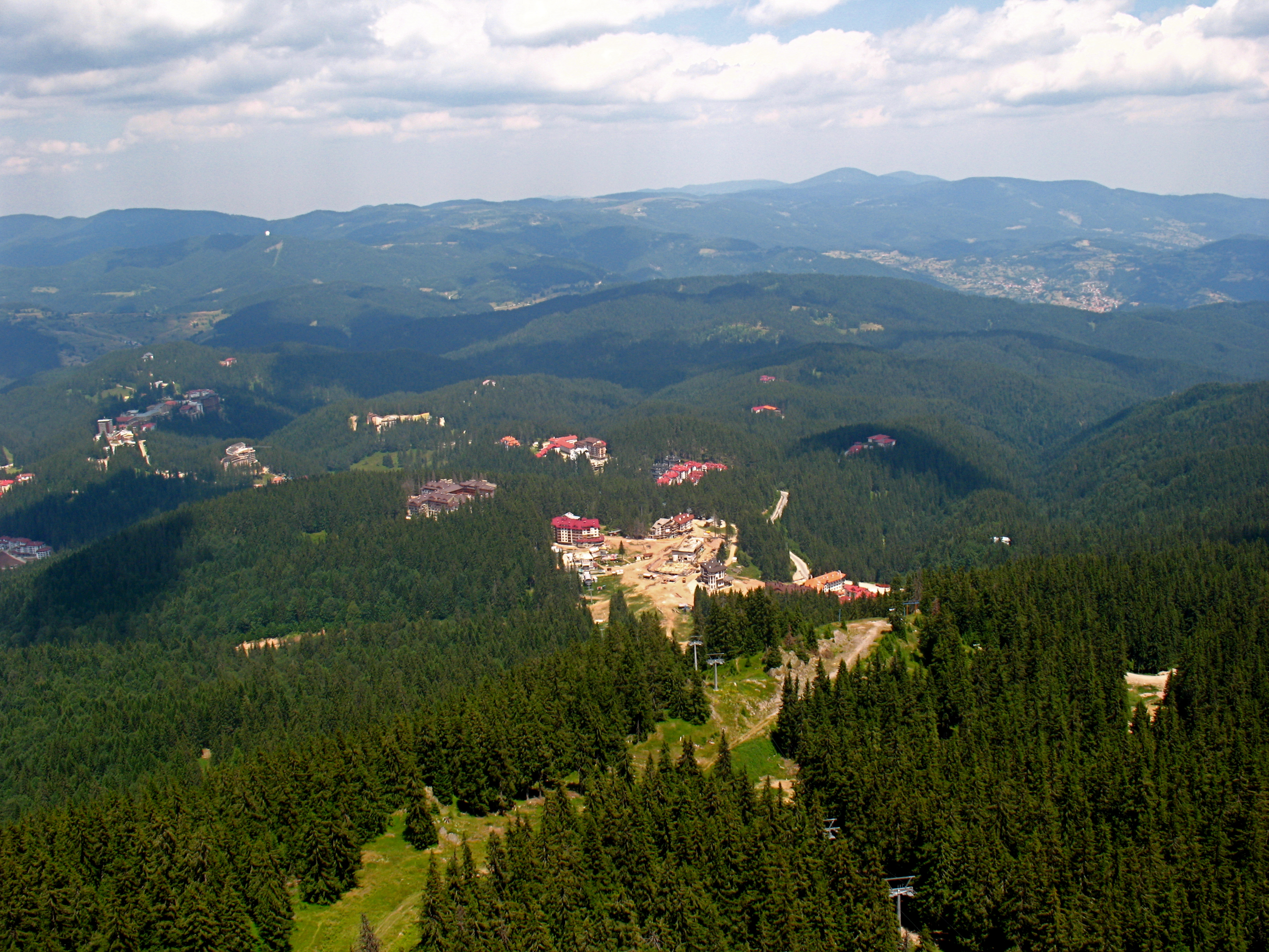 Пампорово_1690